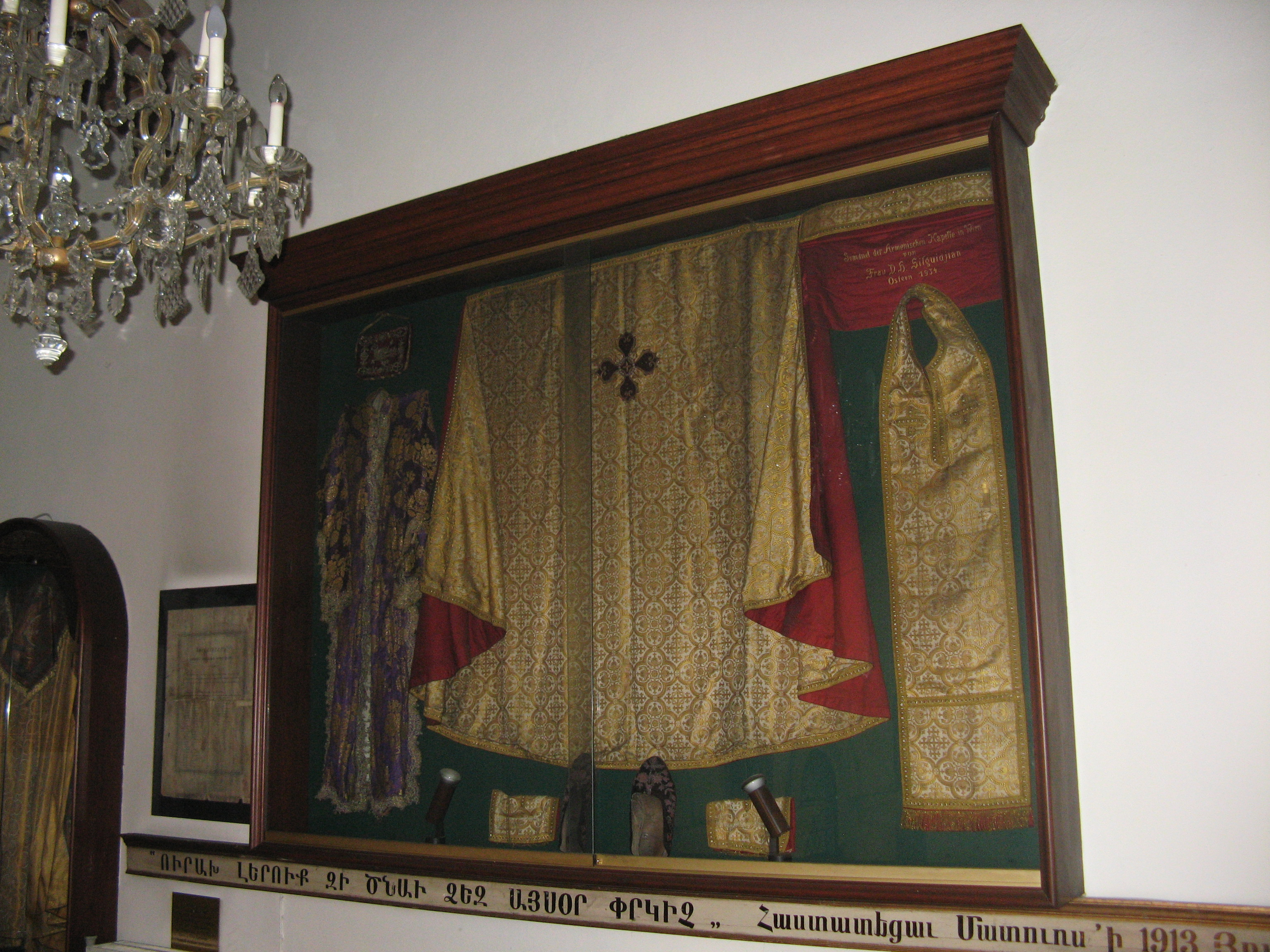 Liturgische Gewänder in Vitrine auf der Empore, Armenische Kirche St. Hripsime, Kolonitzgasse 11, Wien-Landstraße